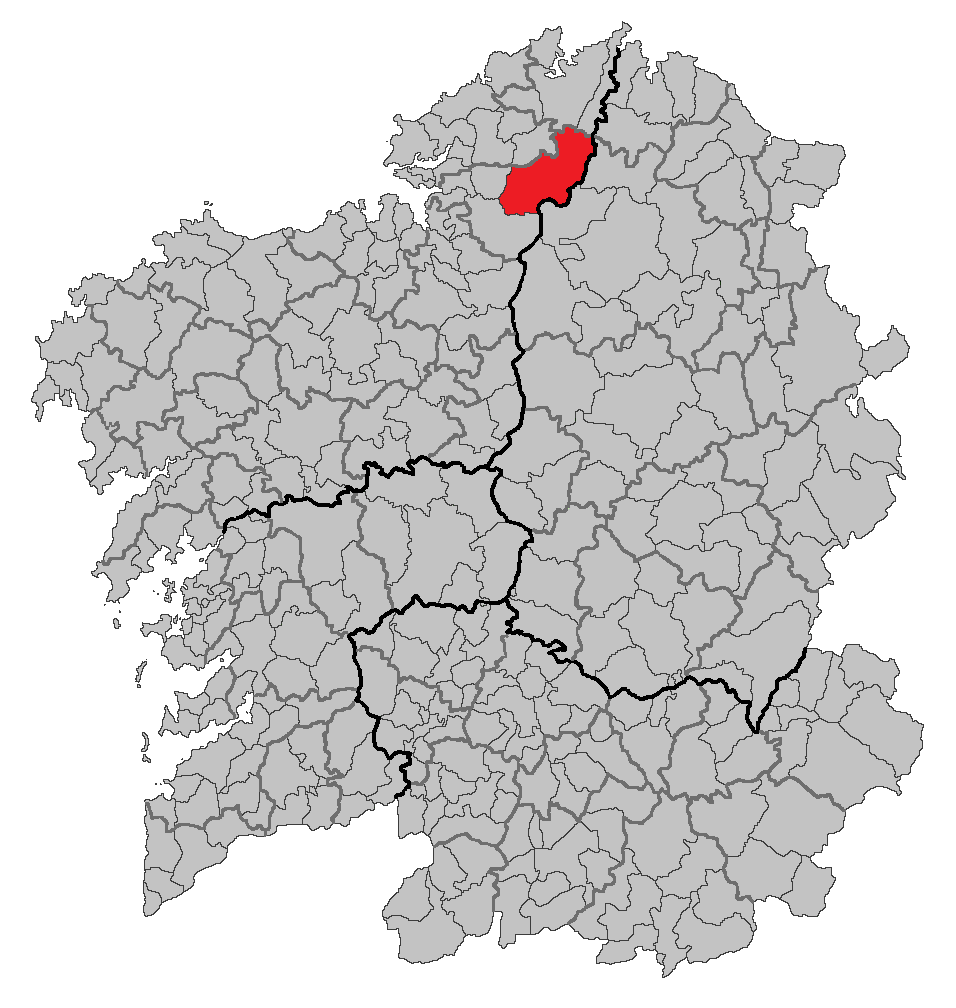 Mapa coa localización do concello de As Pontes de García Rodríguez.